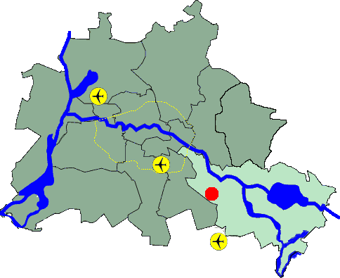 Lage Johannisthal in Berlin